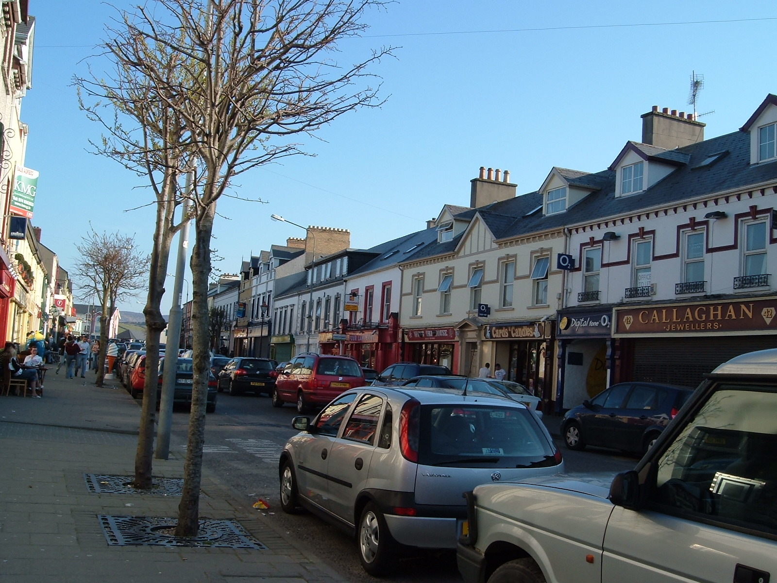 Calle de Buncrana